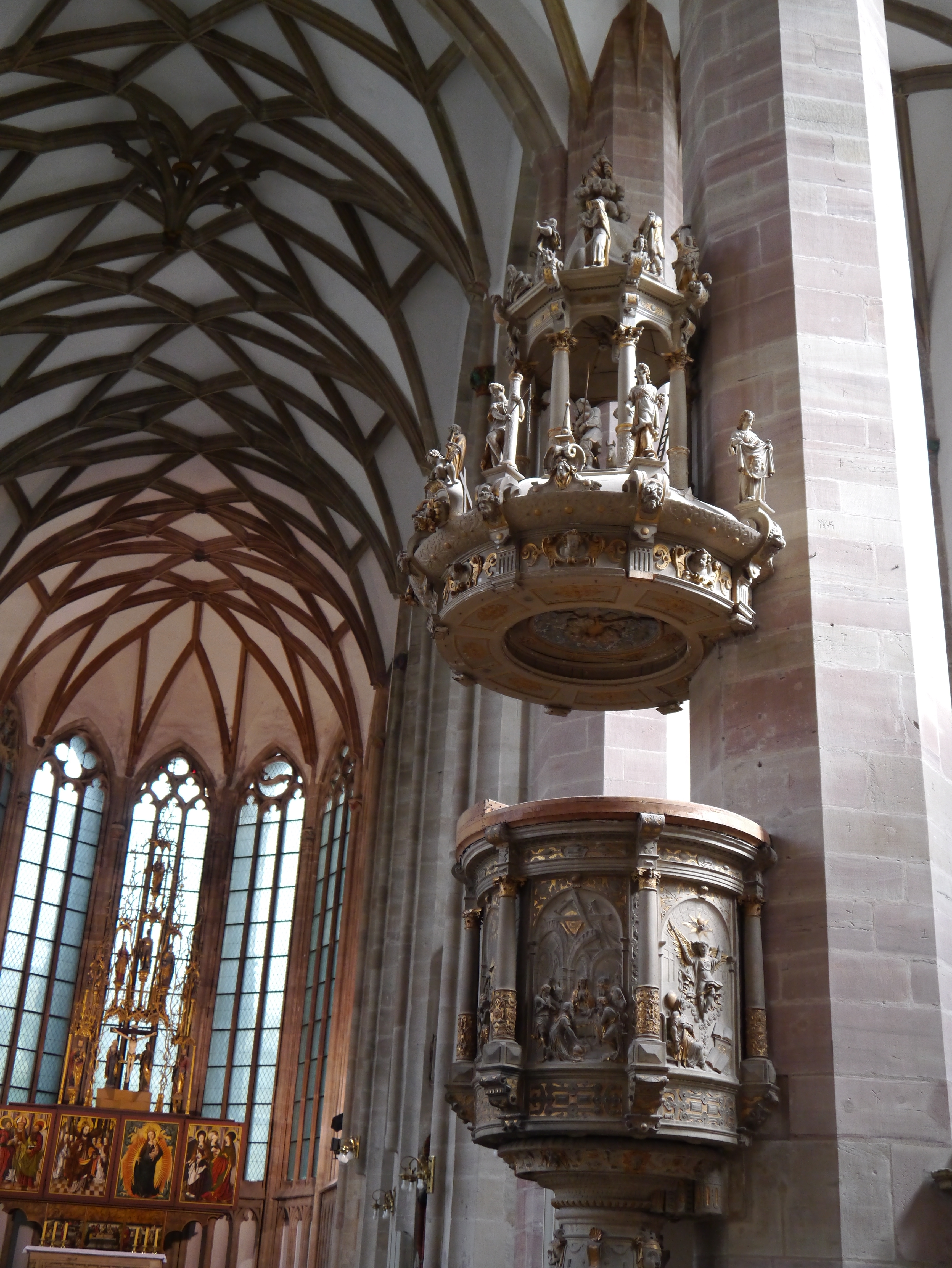 Moritzkirche (Halle) 2012. Kanzel 1592 von Zacharias Bogenkrantz, der Schalldeckel darüber 1604 von Valentin Silbermann.